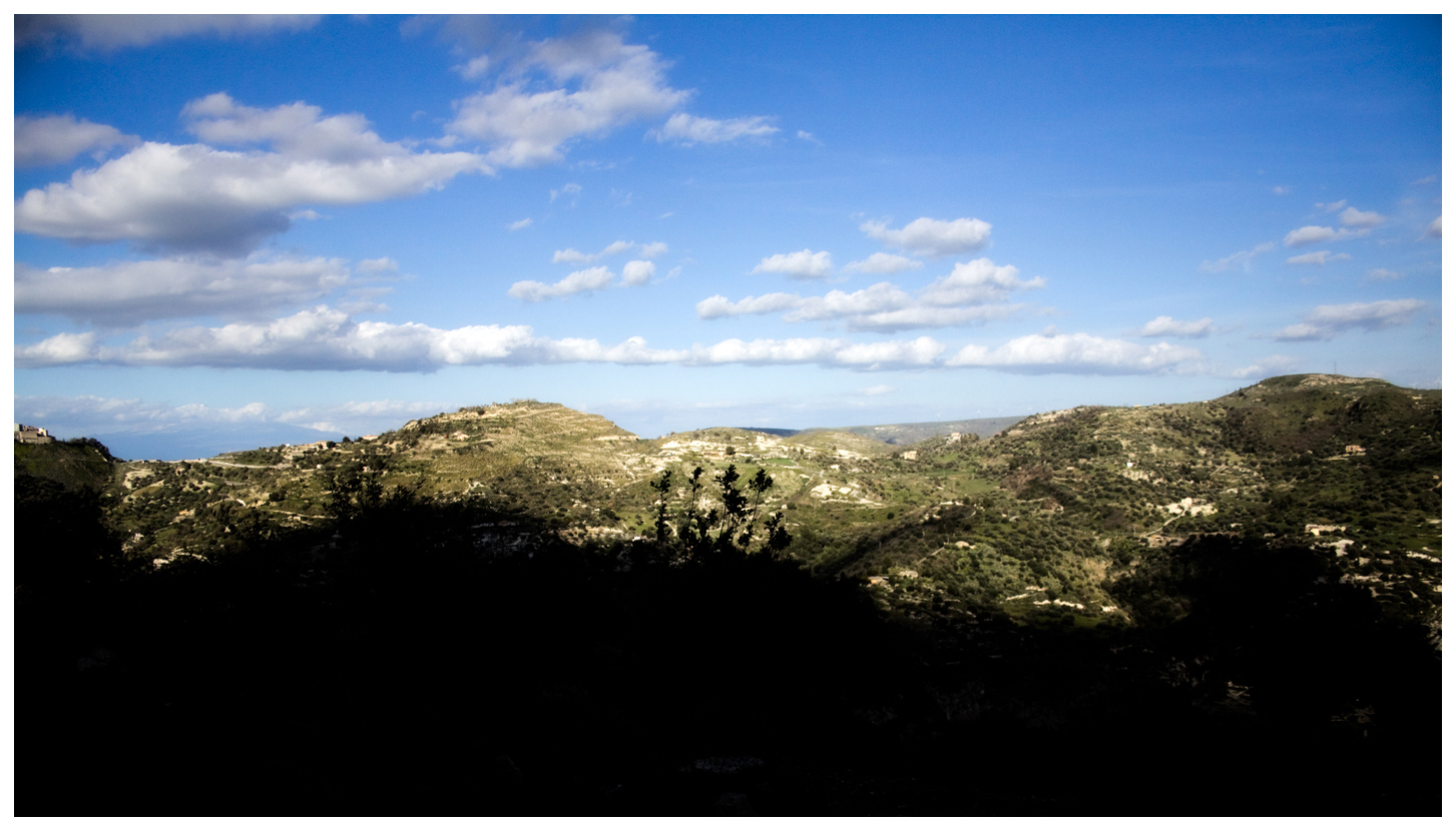 Le colline di mineo